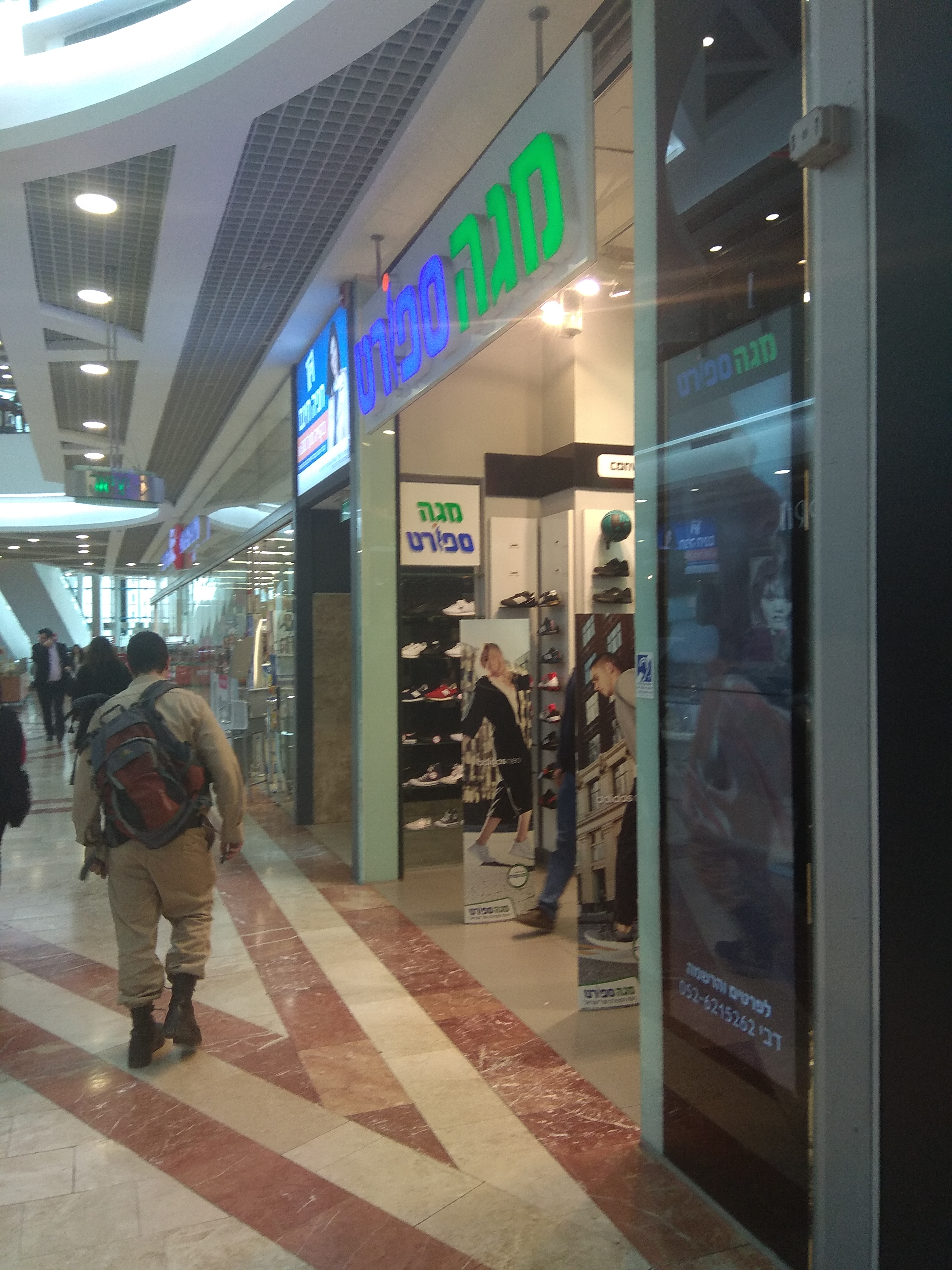 סניף מגה ספורט